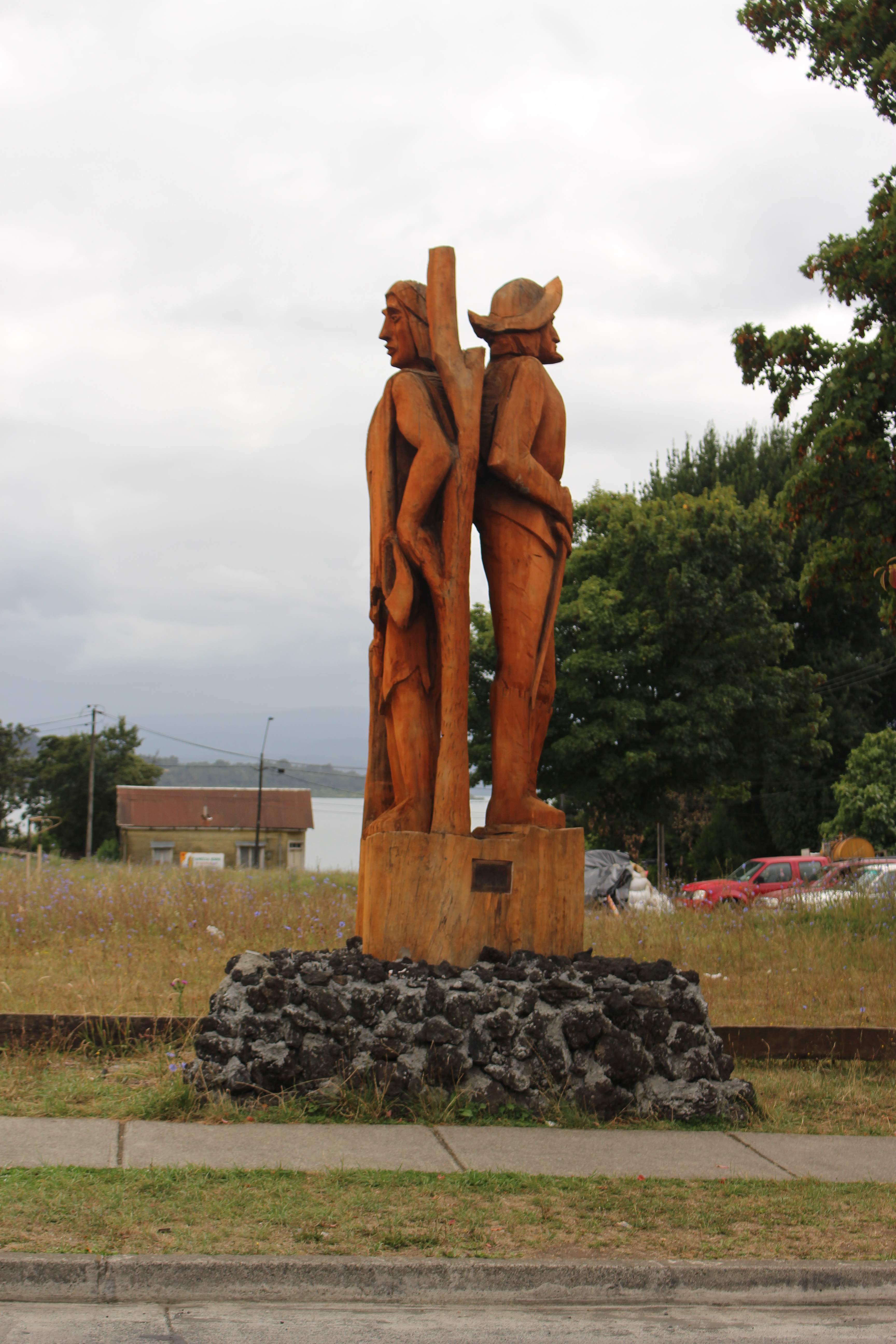 Monumento a Fundación de Villarrica, ubicada en calle Balmaceda con Urrutia en comuna de Villarrica, Chile